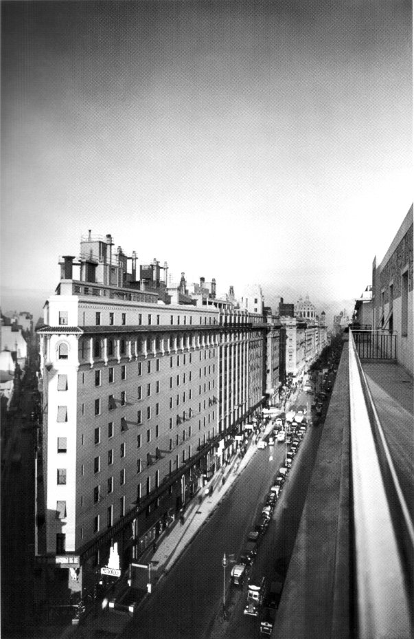 Vista de la Avenida Presidente Roque Sáenz Peña (Diagonal Norte) hacia Plaza de Mayo desde su intersección con la calle Suipacha, Buenos Aires, en 1936.